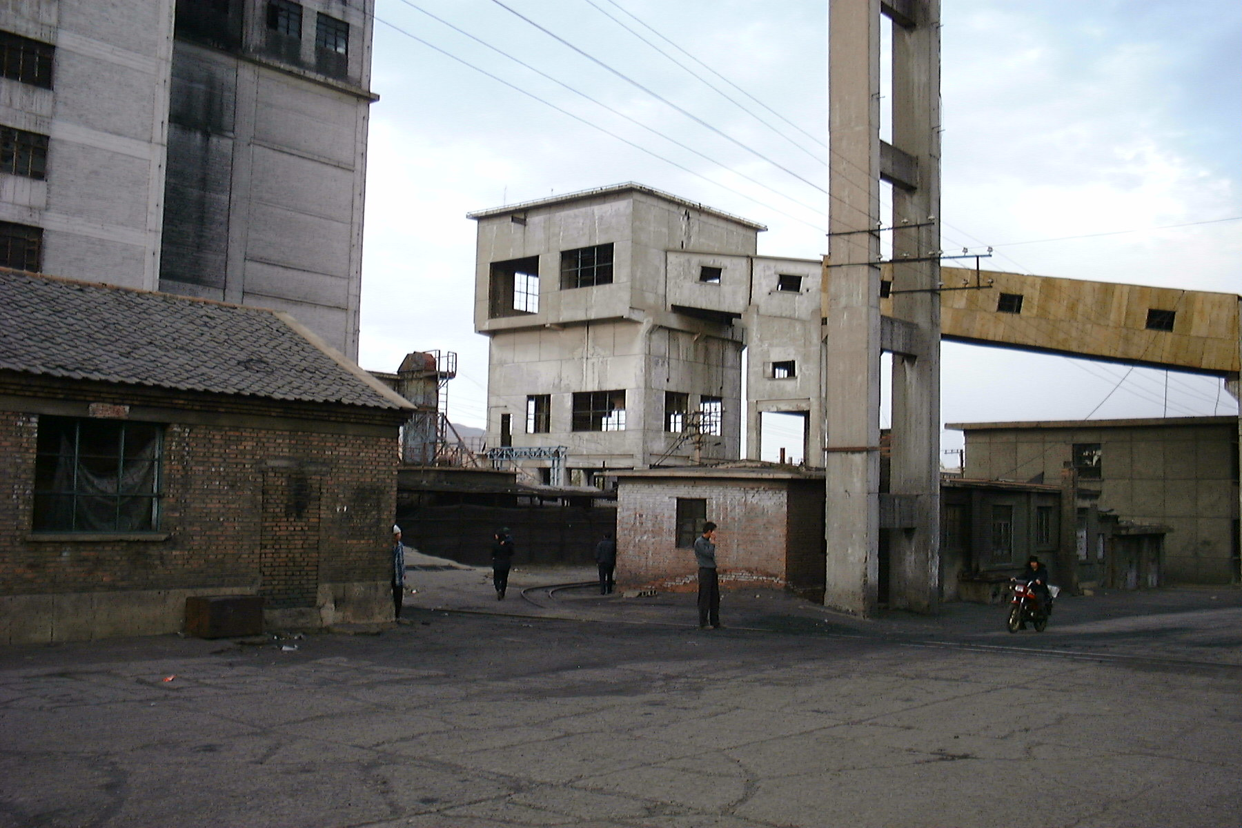 Jin Hua Gong Mine, Datong, Shanxi, China